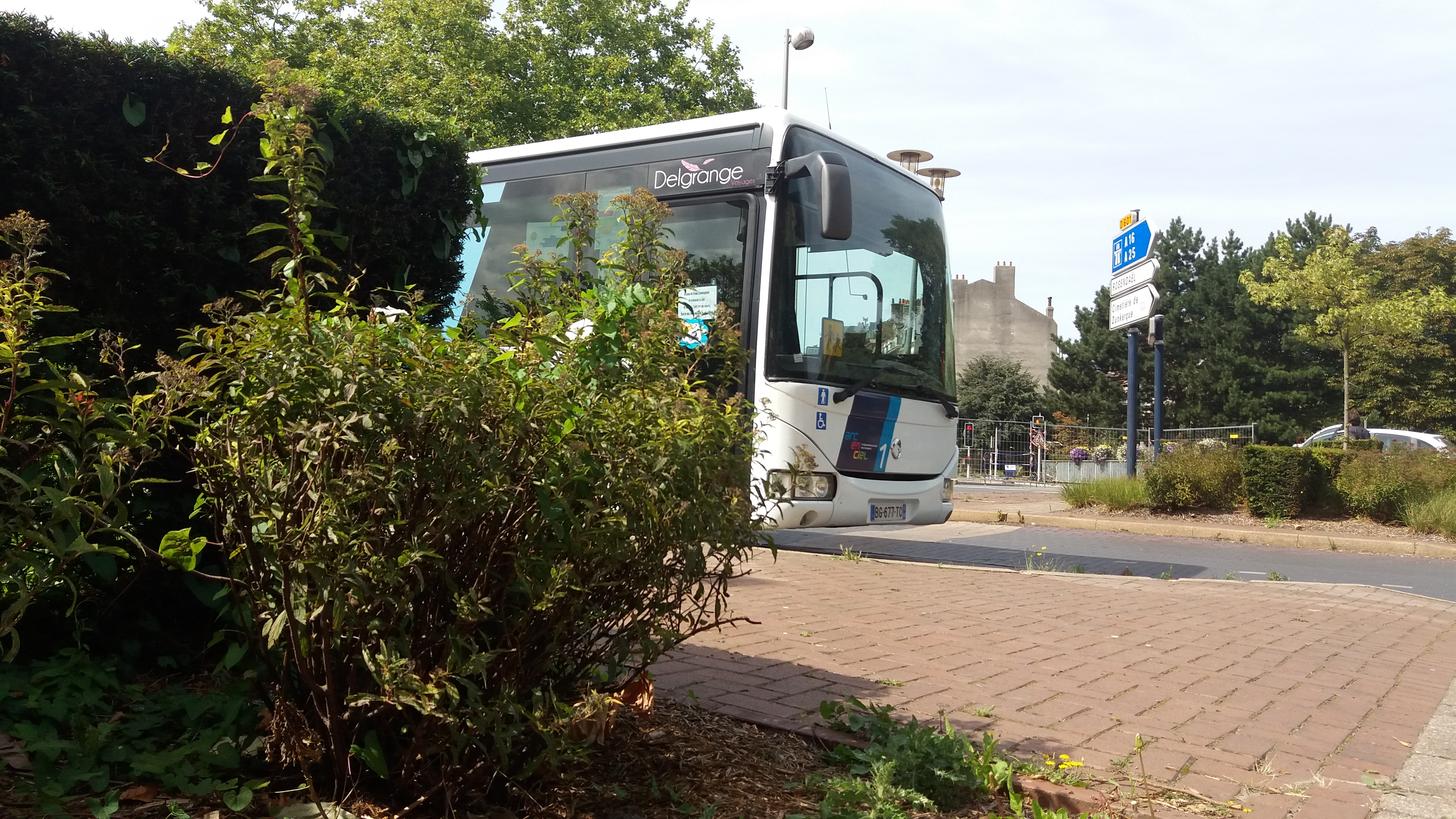 Logo du réseau Arc-en-Ciel depuis le 1er septembre 2017